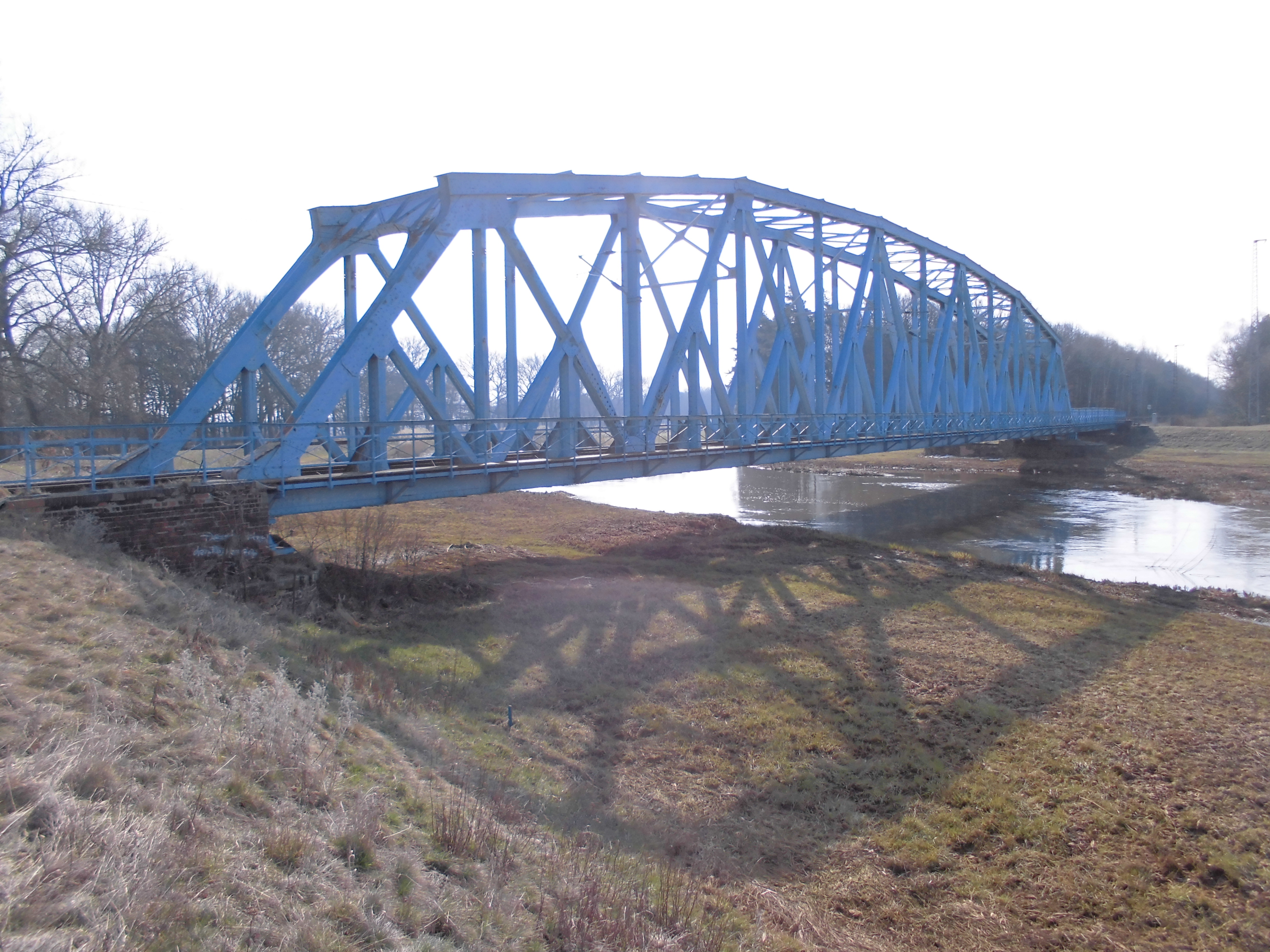 Eisenbahnbrücke über die Schwarze Elster bei Premsendorf, Das Blaue Wunder